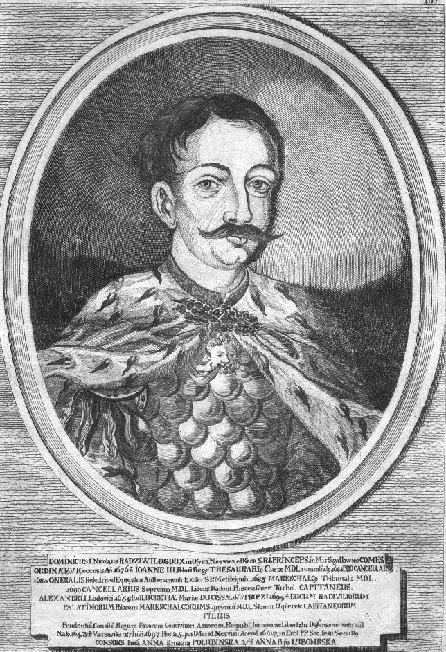 Dominik Mikołaj Radziwiłł